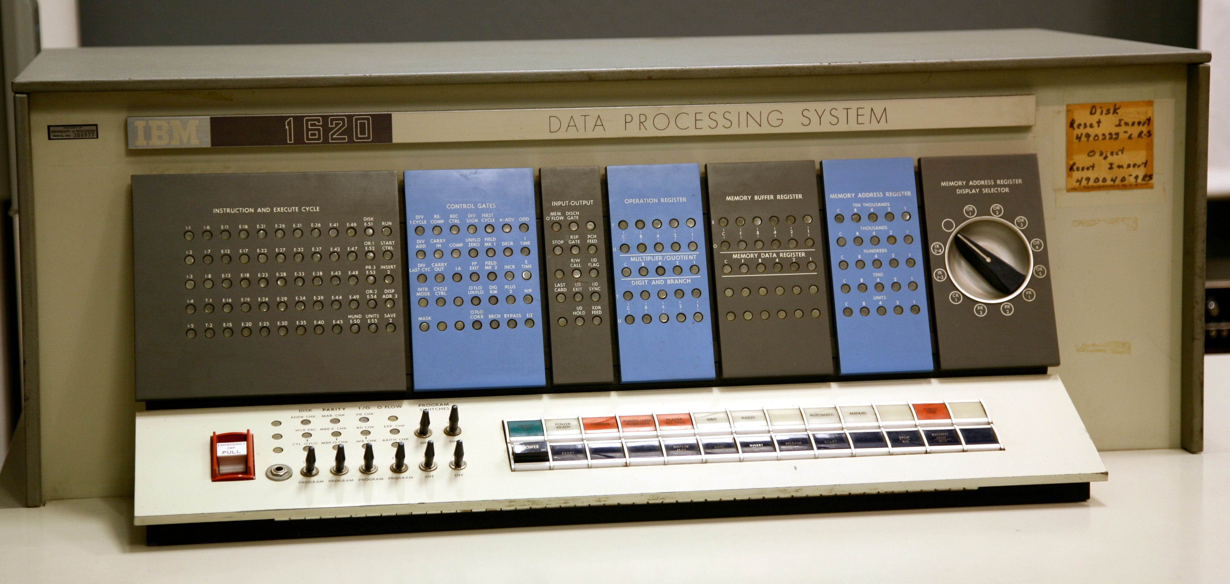 IBM 1620 computer